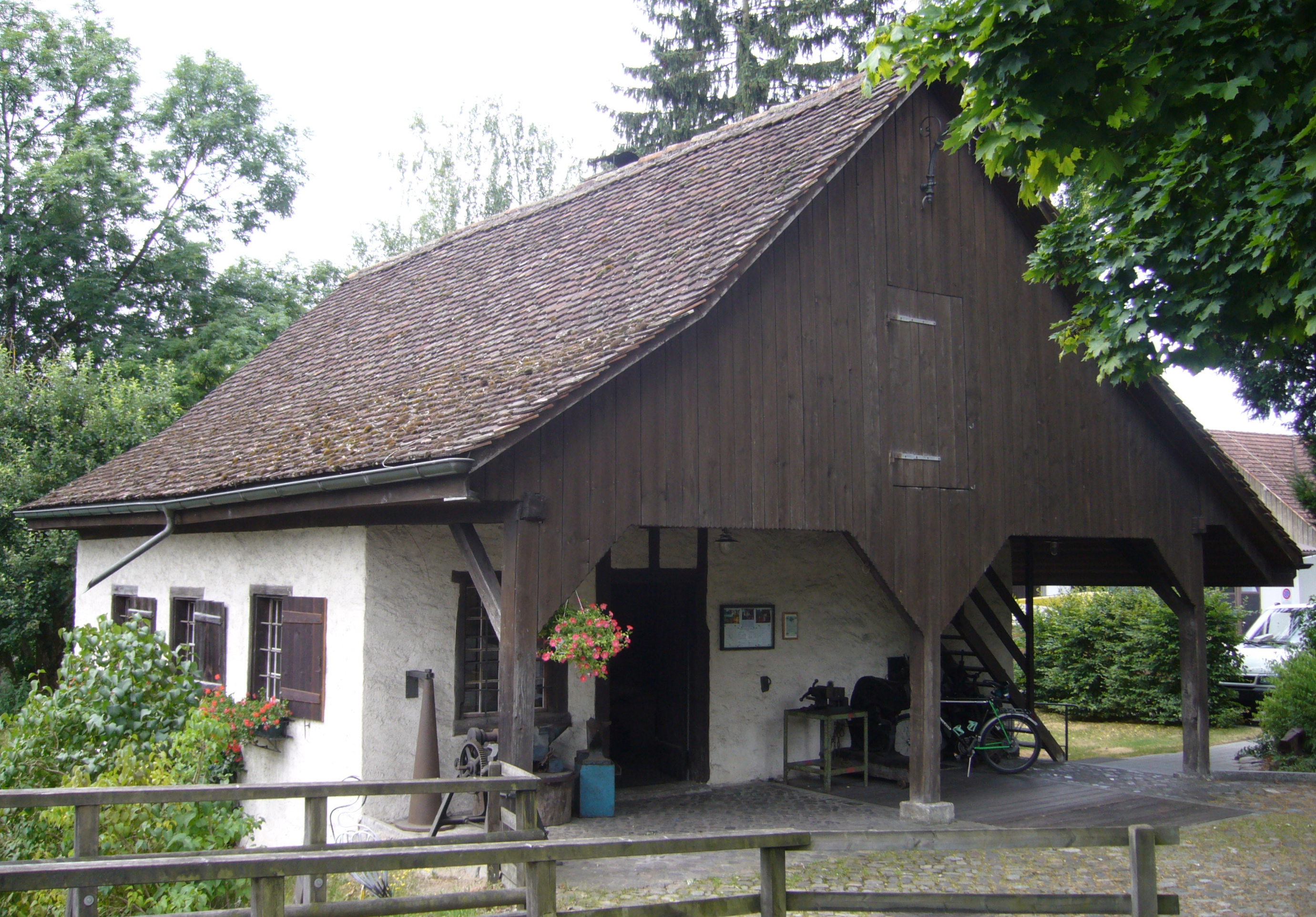 Historische Schmitte zu Bassersdorf.